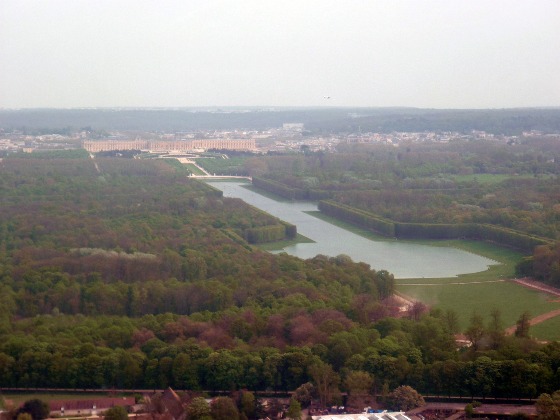 Vue aérienne du château de Versailles, France.